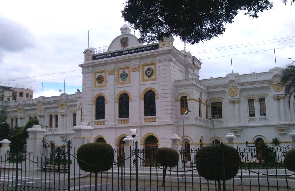 Fachada principal del Palacio de La Recoleta (o de la Exposición), actual sede del Ministerio de Defensa de Ecuador. Ubicado en el Centro Histórico de Quito.